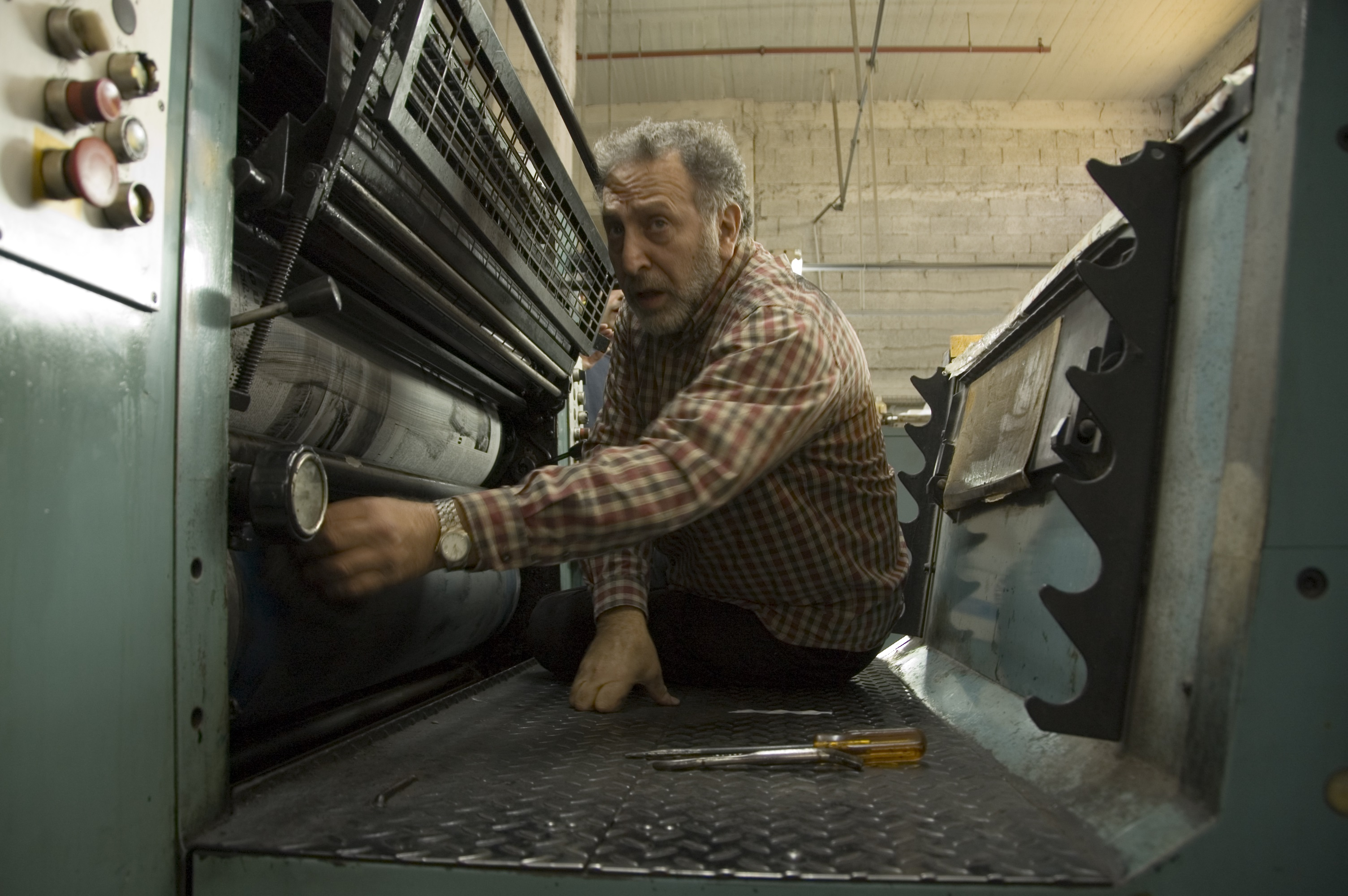 מכרם ח'ורי בסרטו של תום שובל "פתח תקוה", 2005